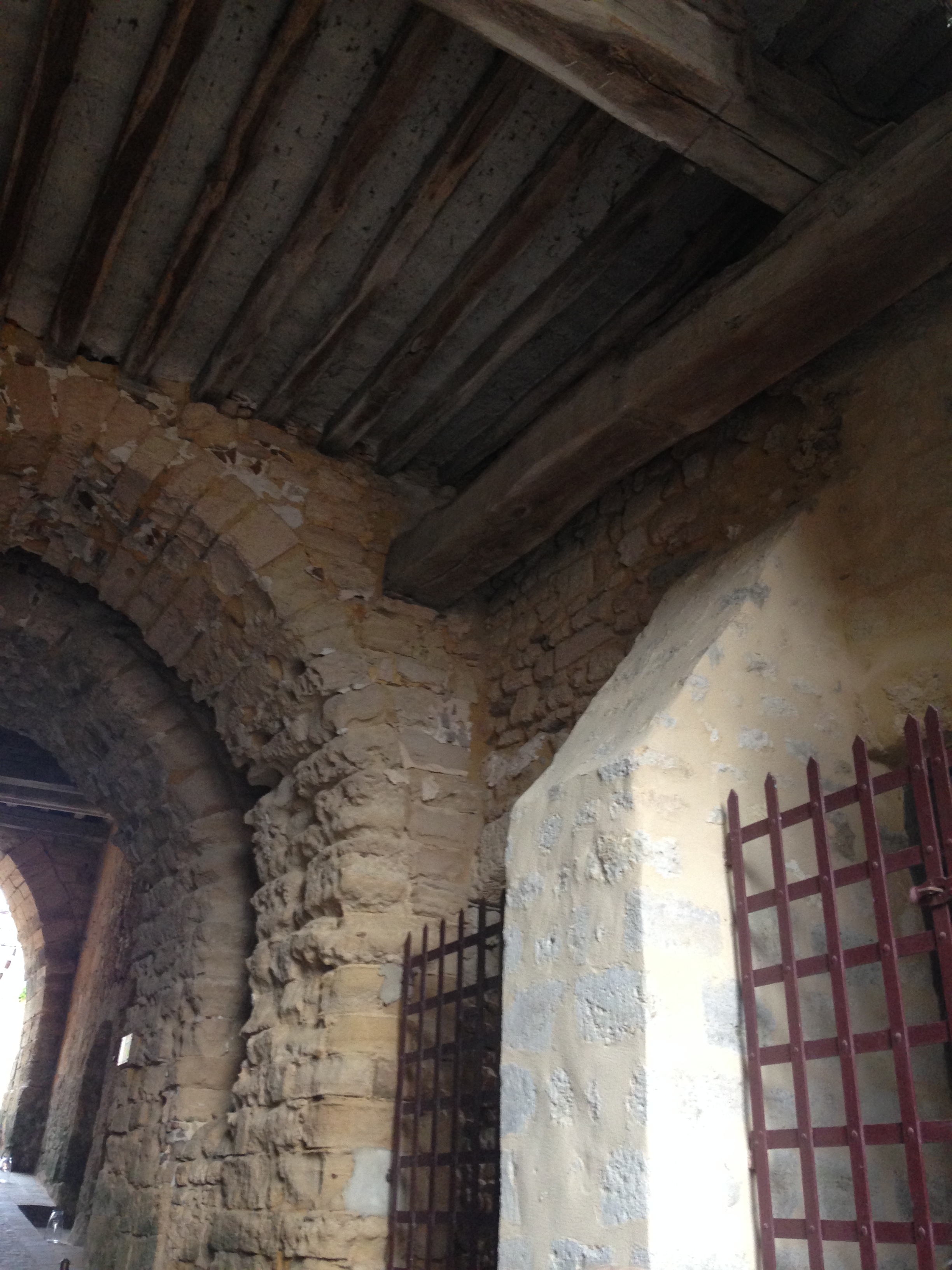 Bellême - situation de la restauration du Porche en 2016. La 1ère tranche des travaux de restauration fut réalisée en 2015 (à droite), avant que ne commence la 2e tranche (à gauche). Nous pouvons voir que le sel, au contact de l'humidité, a attaqué la pierre qui se transforme en grain de sable.